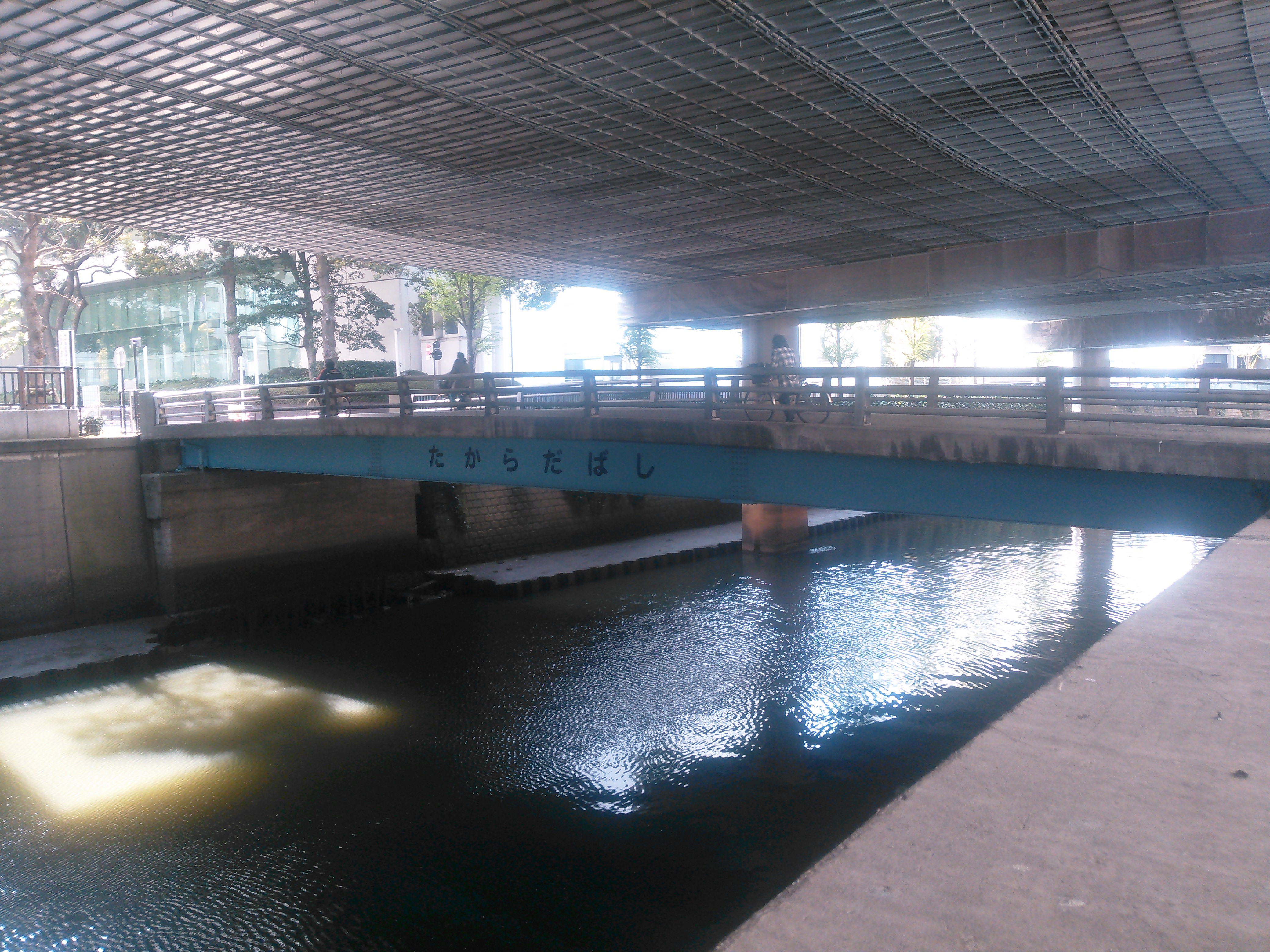 東京都千代田区、日本橋川に架かる宝田橋